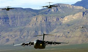 Informazioni : Descrizione= C-17 Globemaster III in formazione. Provenienza=[1] Permesso=U.S.Air Force photo— Public domain